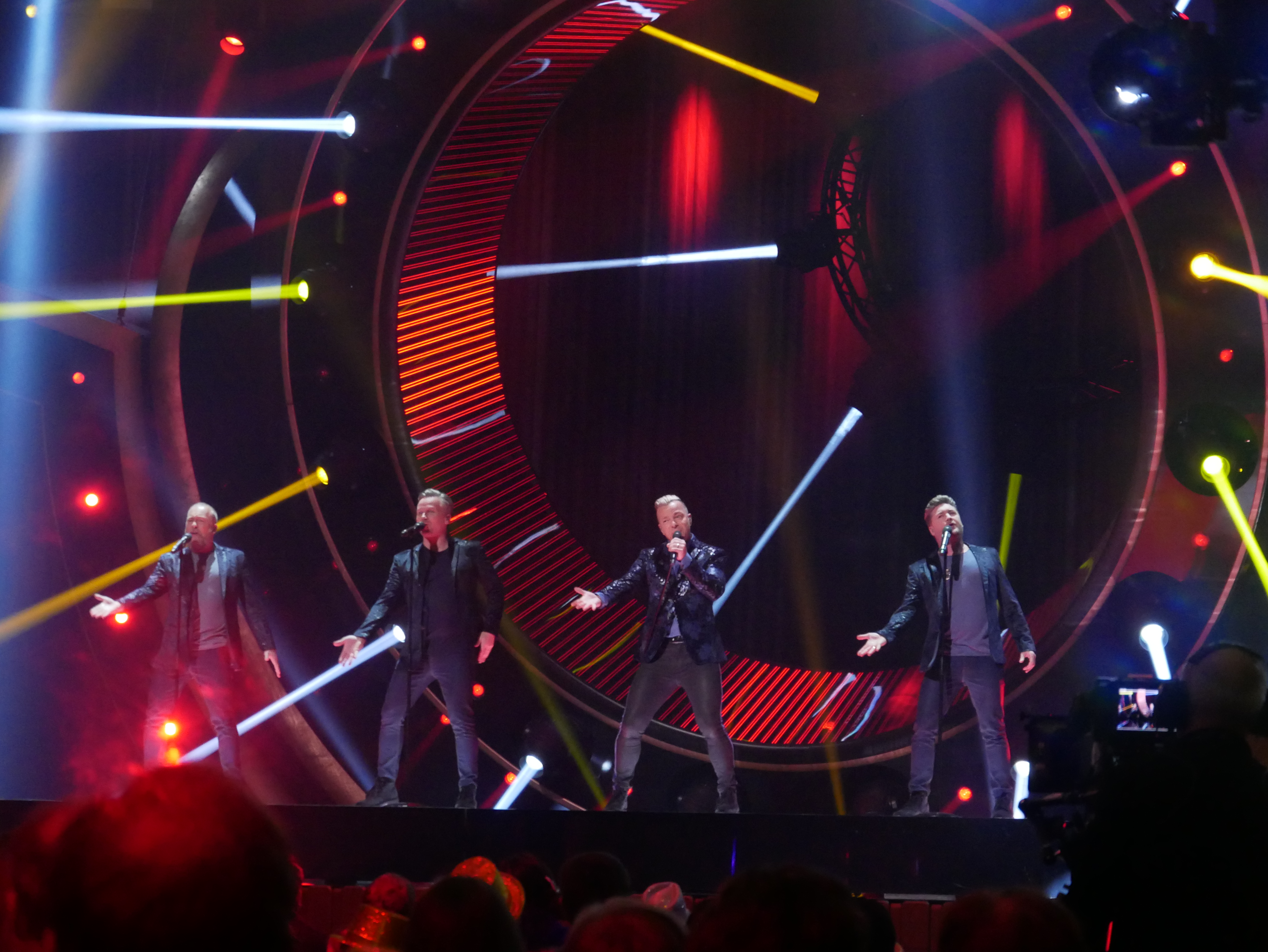 Melodifestivalen 2019 i Nyköping